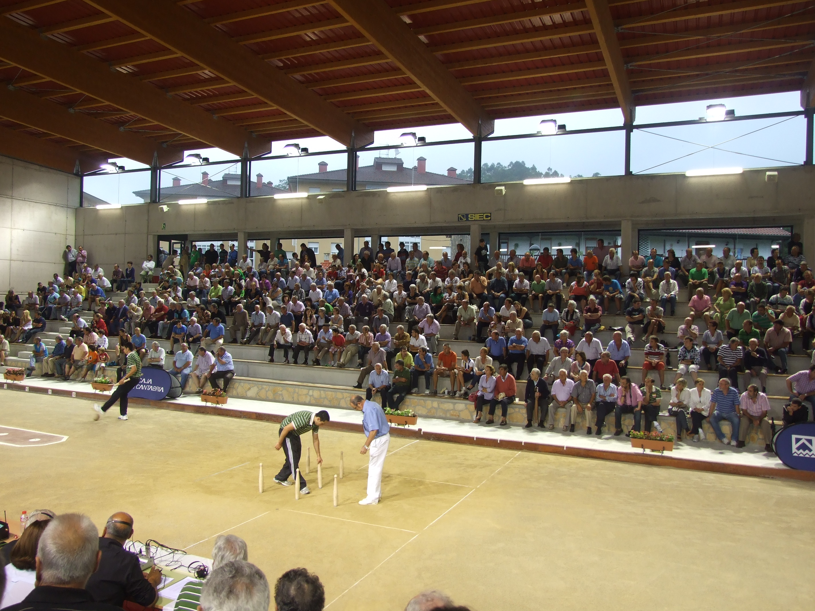 Bolera La Encina en La Cavada (Cantabria, España) durante el Campeonato de Cantabria de Bolo Palma